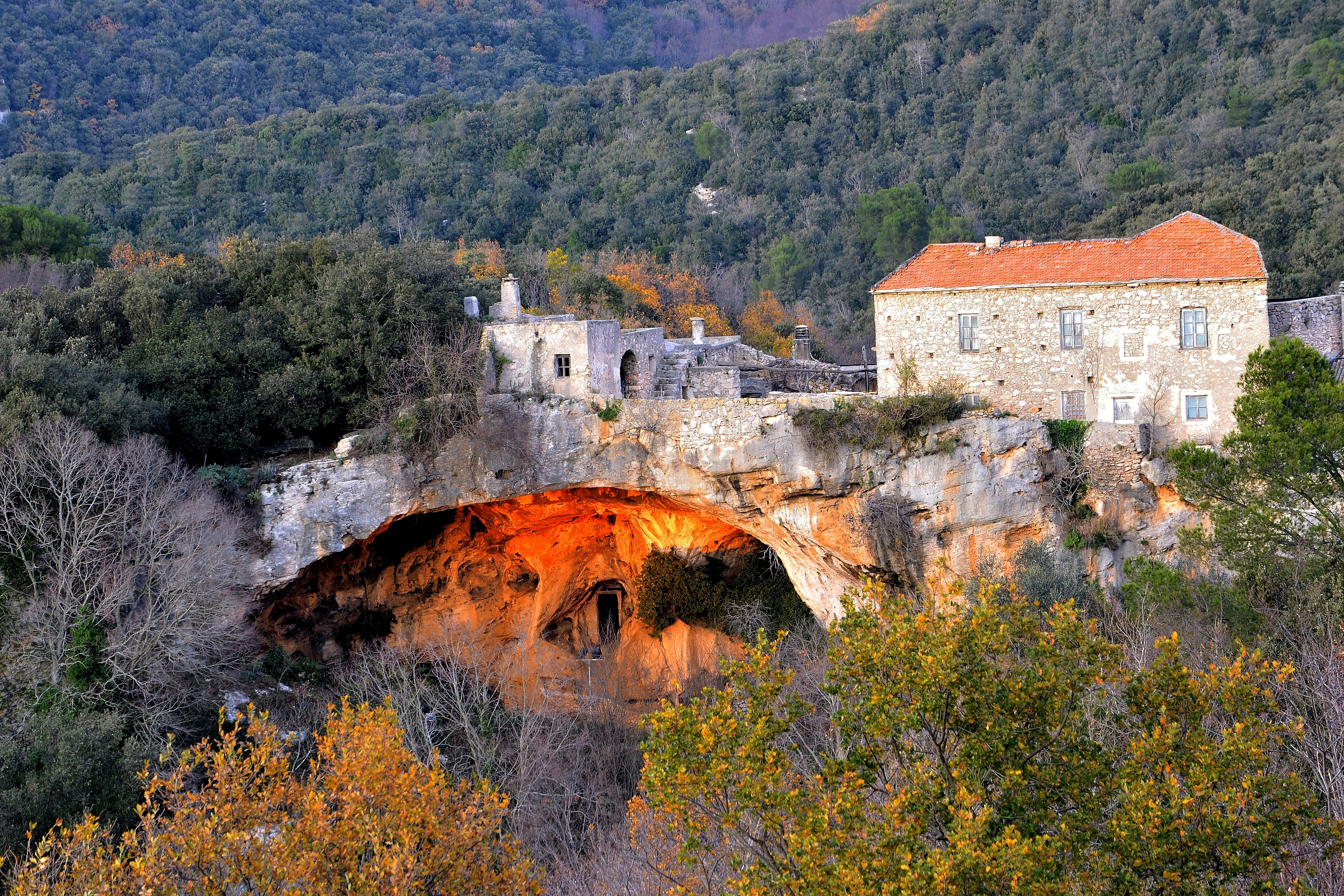 Arma delle Manie - MIBAC This is a photo of a monument which is part of cultural heritage of Italy.